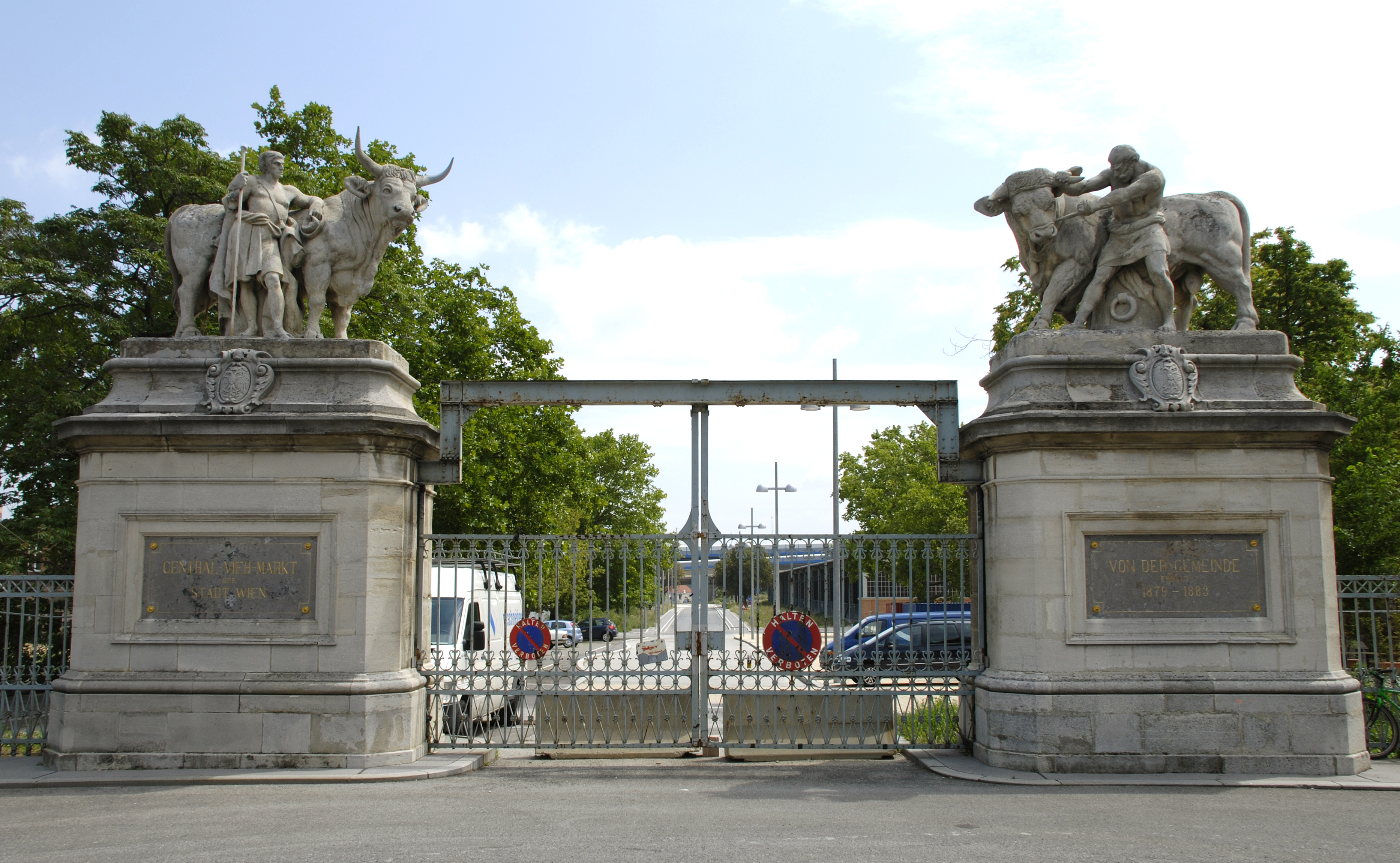 Viehmarktgasse, 1030 Wien, Zentral-Viehmarkt St. Marx - Portal